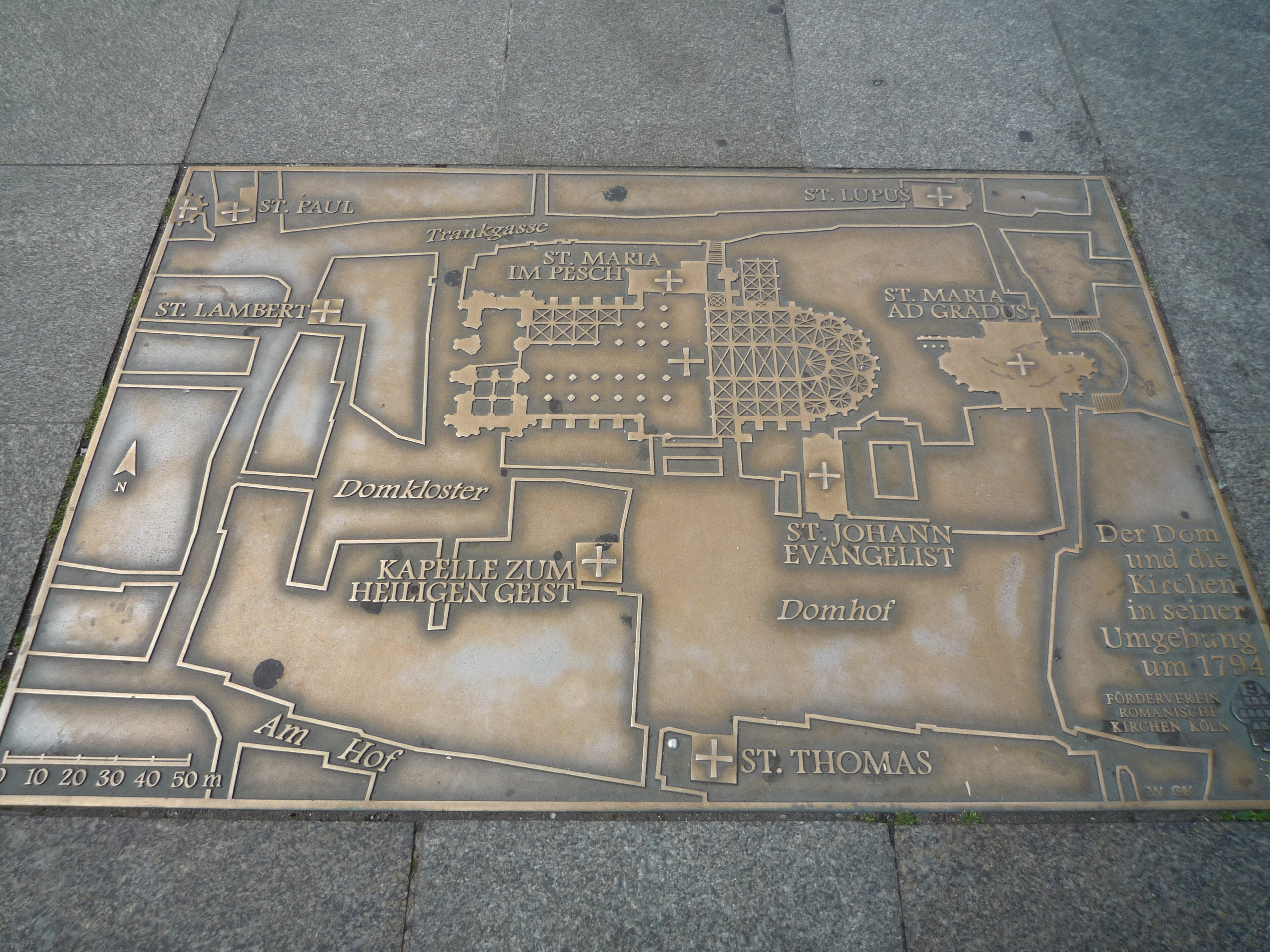 Bronzeplatte Köln